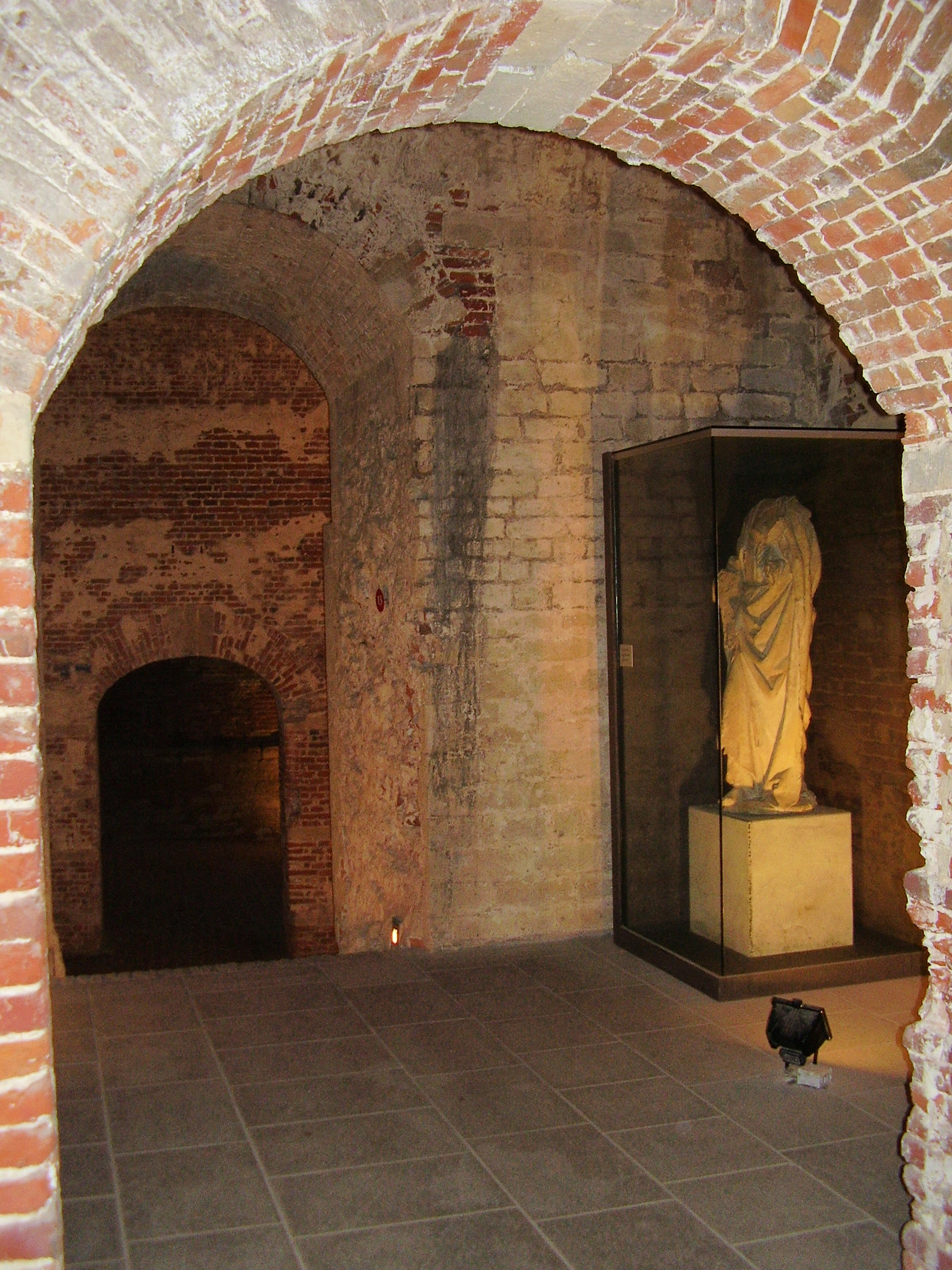 Description: Ancien Palais du Coudenberg (Bruxelles) - statue d'apôtre du XVe S. découverte dans les remblais Author: User:Ben2 Date of creation: 12 juin 2006 Source: Photo personnelle